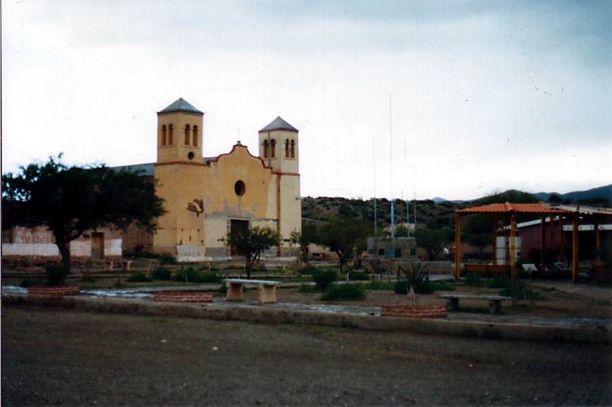 La iglesia de Suipacha que ha sido declarada monumento nacional de Bolivia.